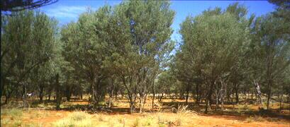 Un bois ou mulga dans le sud-ouest du Queensland. Les plus grands arbres mesurent 7 m